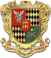 Герб Коростишівського району